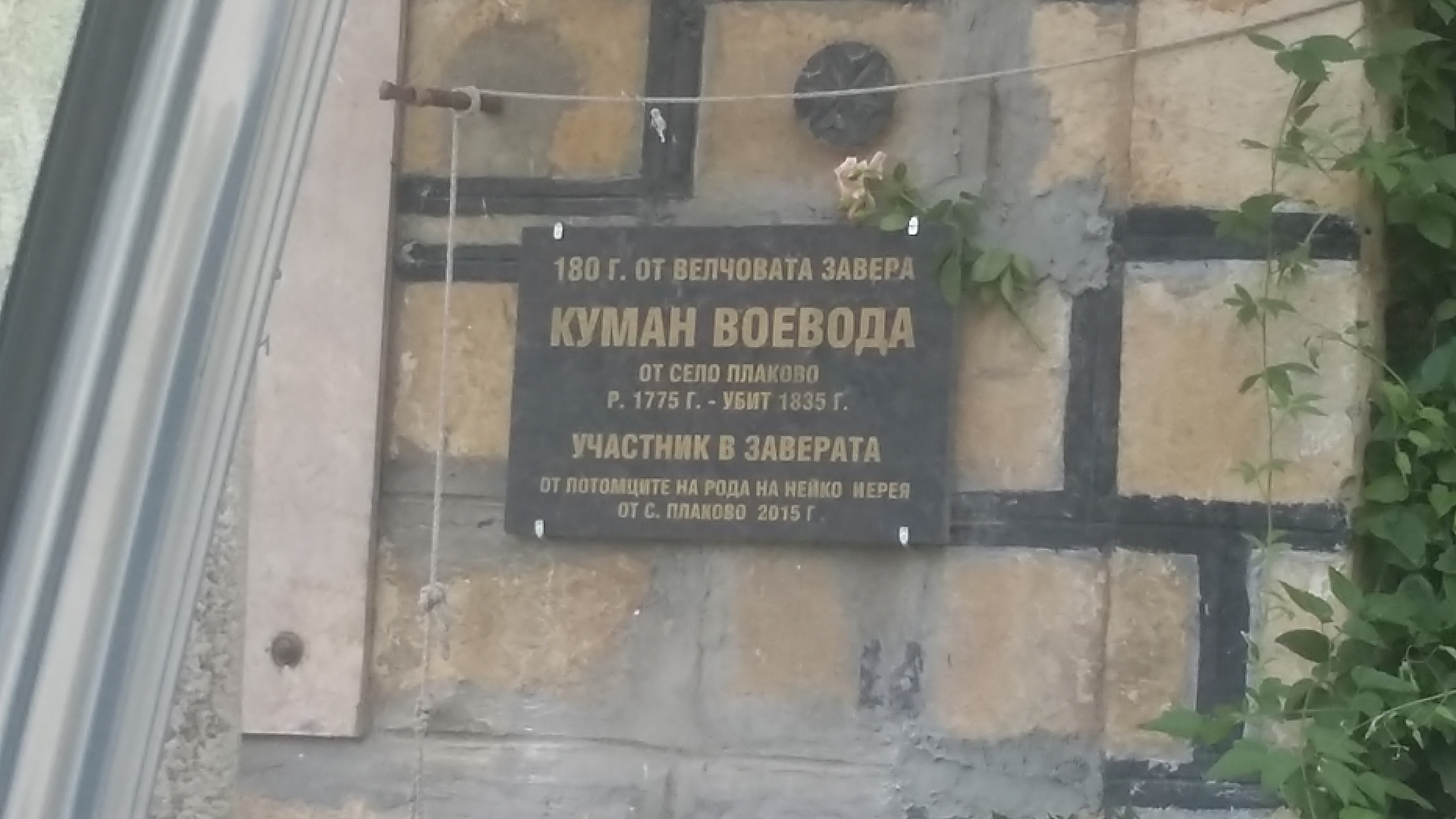 Паметна плоча на Куман Войвода в Плаковския манастир, поставена от родствениците му през 2016г.